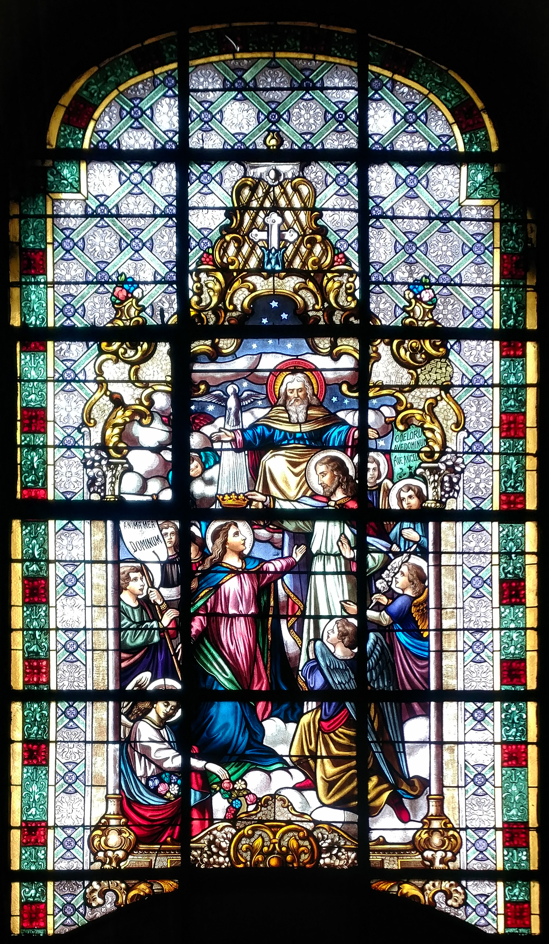 Kirchenfenster Alserkirche Wien, Kirchenfenster auf der Orgelempore über dem Eingangsportal